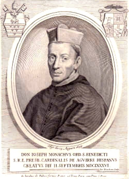 Cardenal José Sáenz de Aguirre (1630-1699).